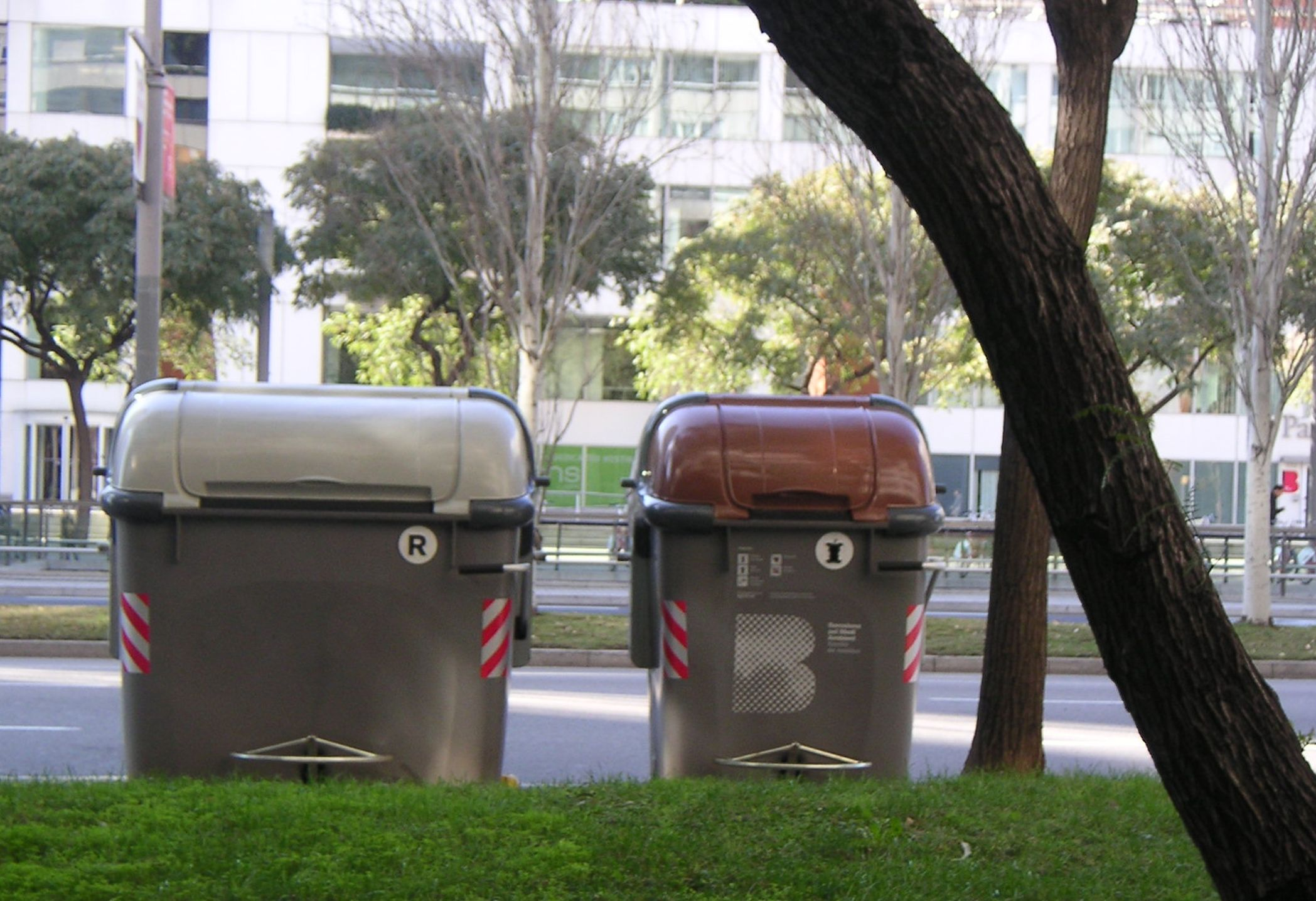 Contenidors per a recollida selectiva dels residus sòlids urbans a Barcelona. El de la tapa blanc és per a matèria inorgànica mentre que el de la marró és per l'orgànica.